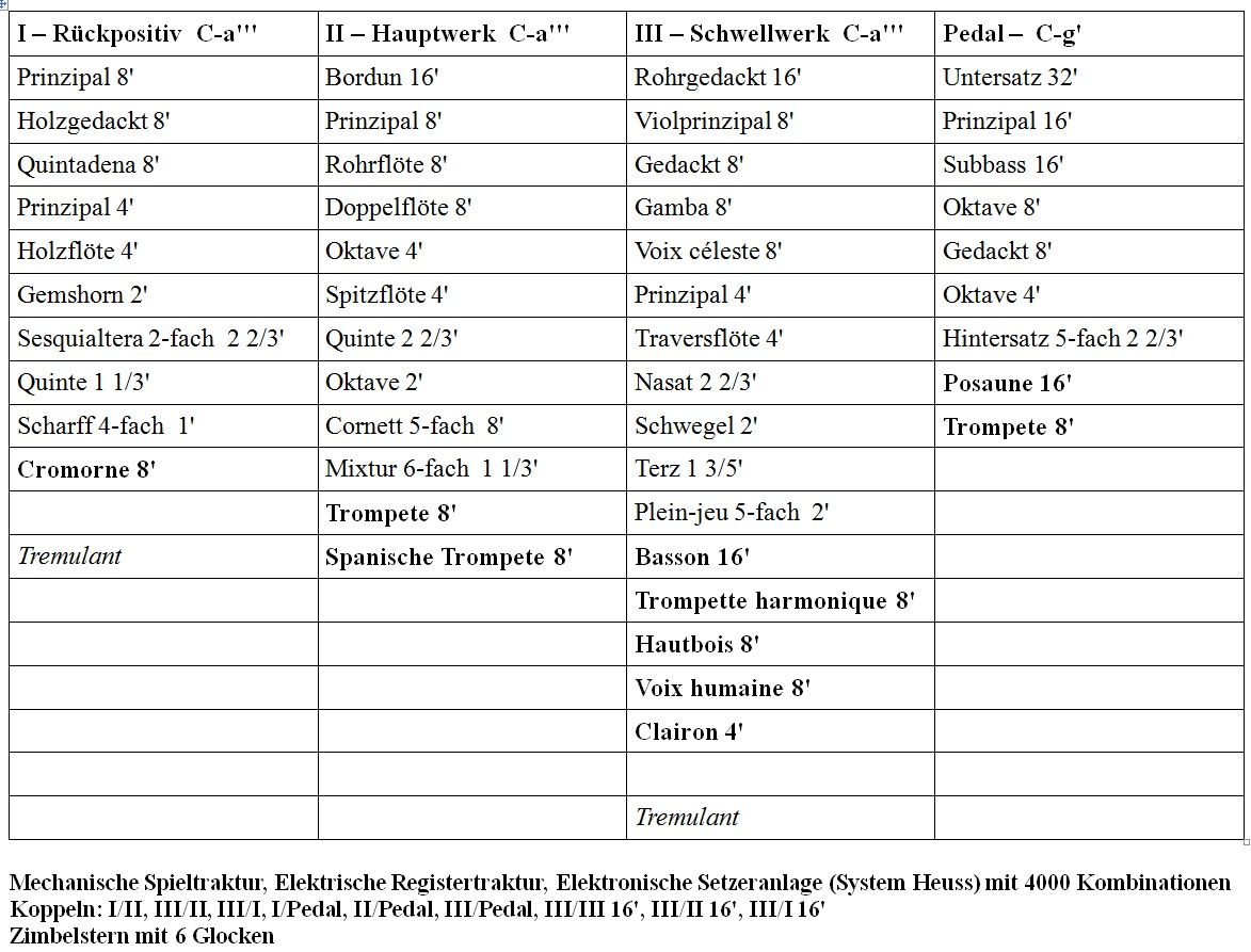 Disposition der Beckerath-Orgel in der Großen Kirche zu Bremerhaven